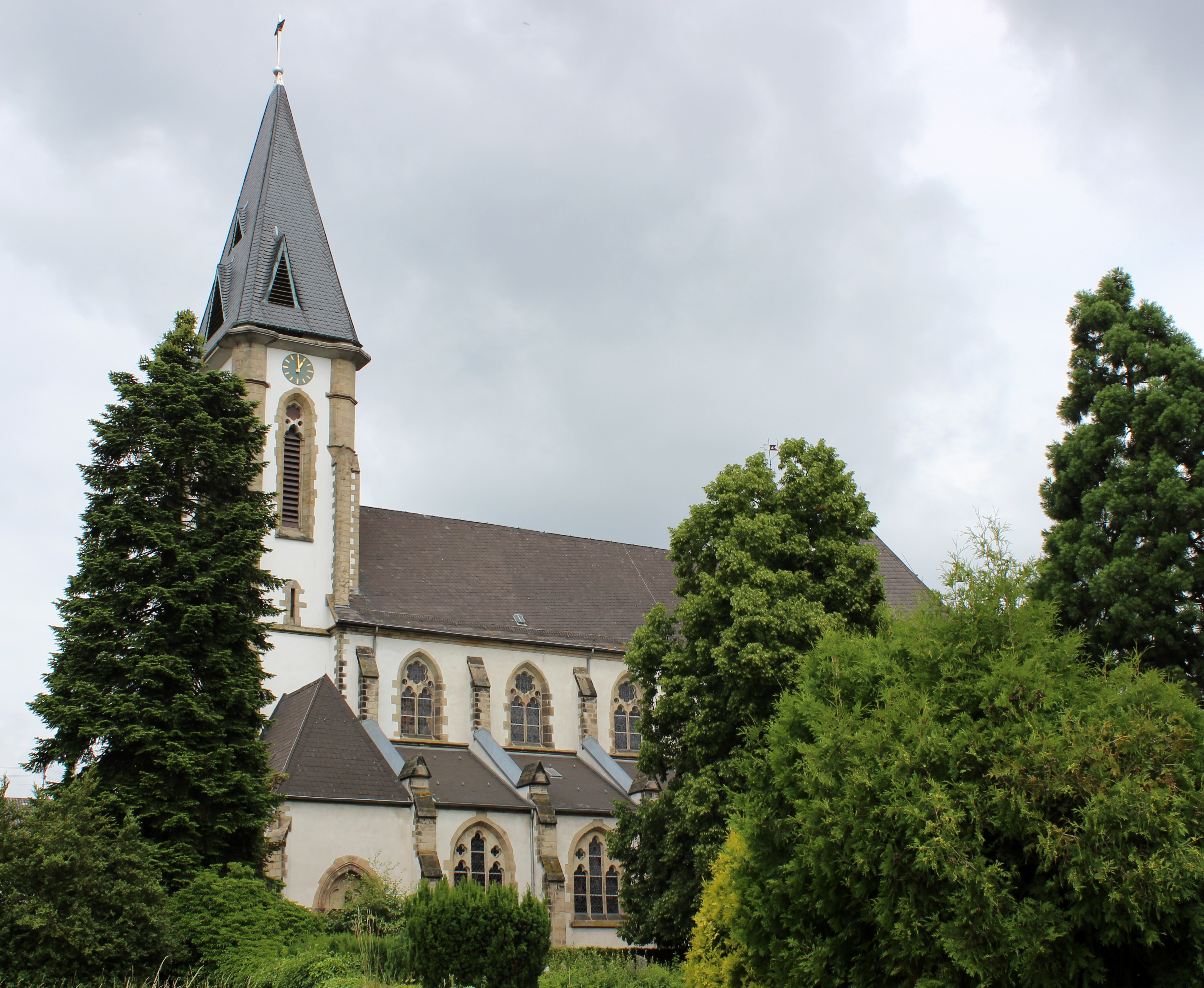 Die katholische Pfarrkirche St. Martin in Schwalbach, Landkreis Saarlouis, Saarland